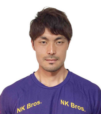 柳川/画像